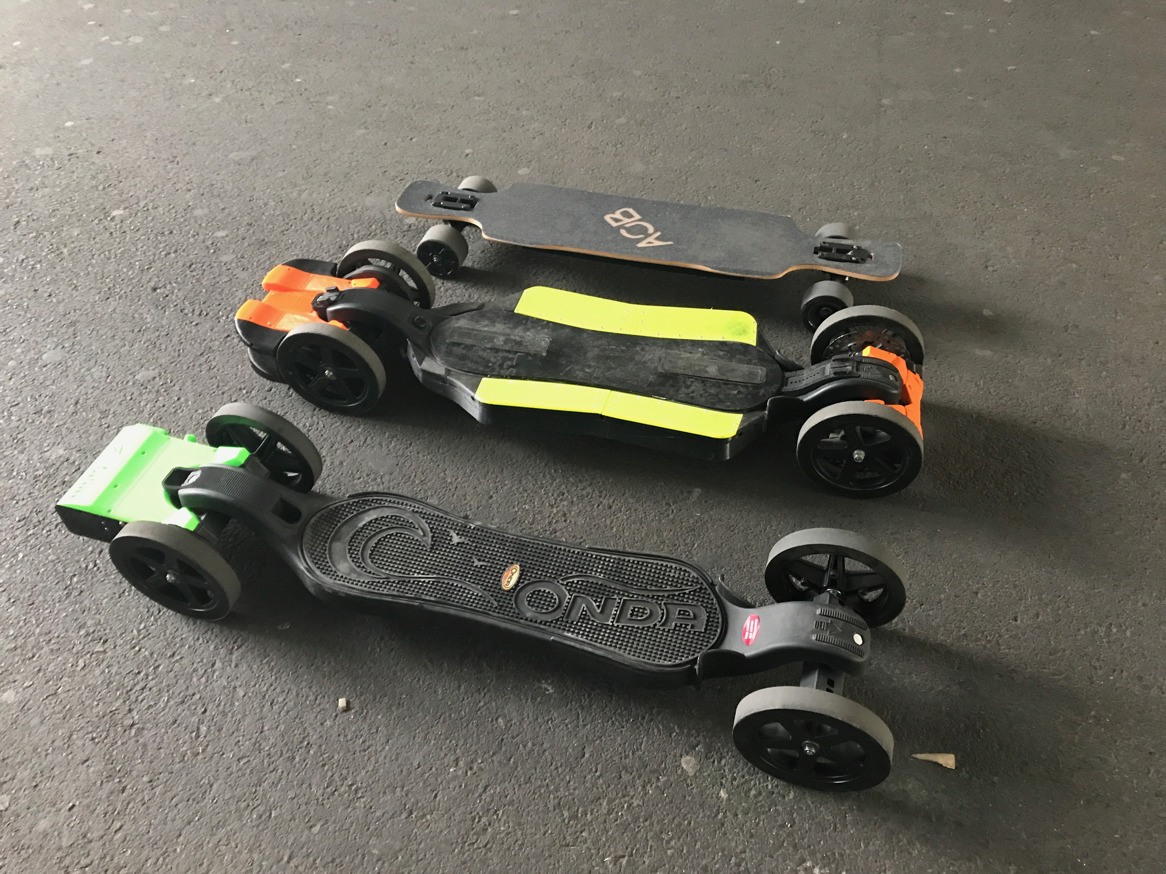 In Internetforen tauschen sich DIY (Do it Yourself) Elektro Skateboarder aus, um Komponenten, die in 3 D Druckern repliziert werden, für alle verfügbar zu machen. So kann man sich eine Elektro Skateboard selber bauen.